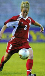 Carmelina Moscato